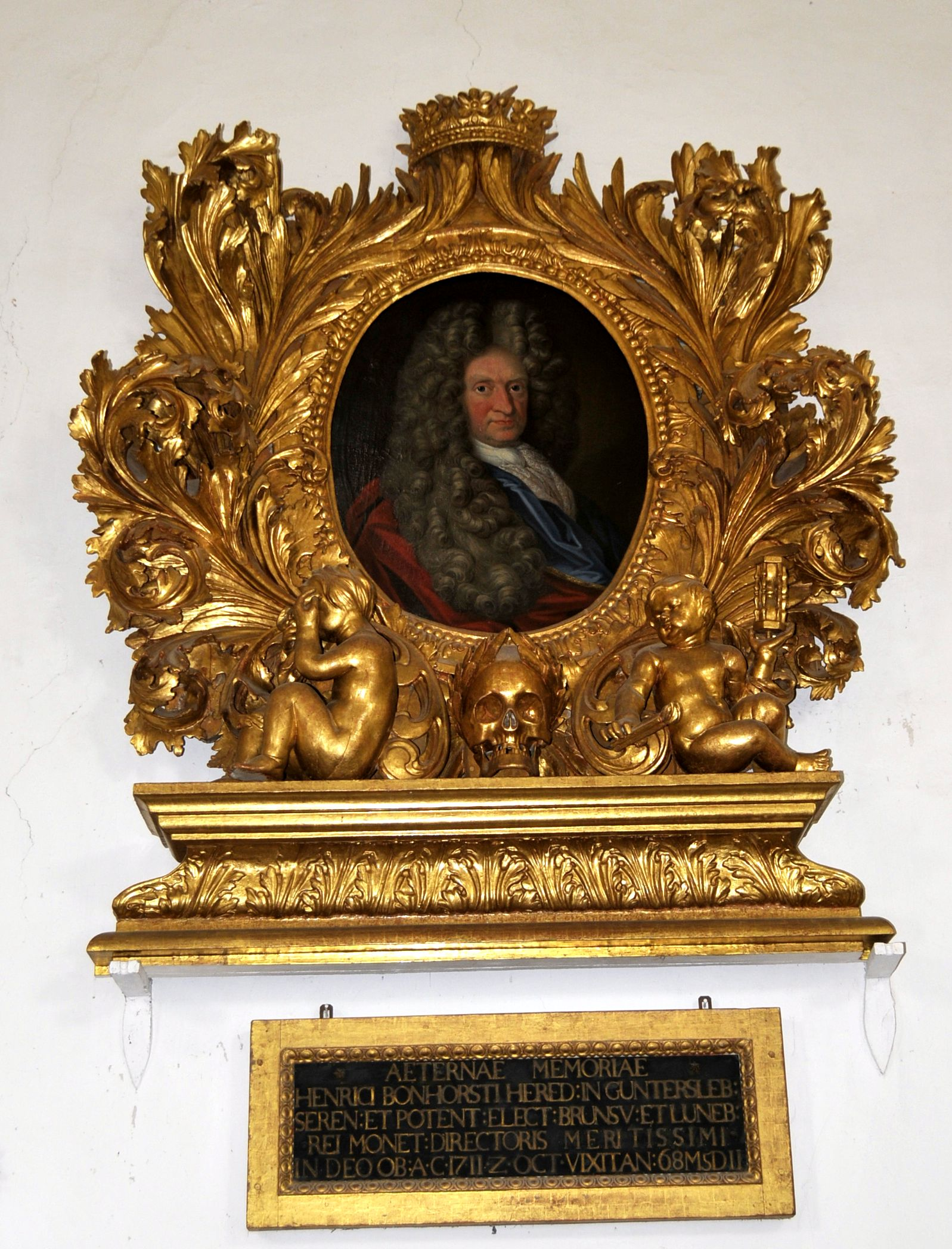 Kirche in Günthersleben